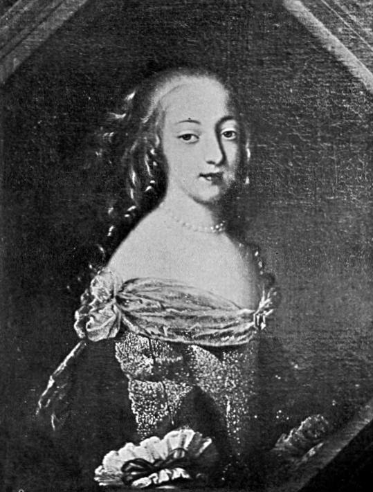 Françoise Athénaïs de Rochechouart de Mortemart (1640-1707), marquise de Montespan, aka Madame de Montespan